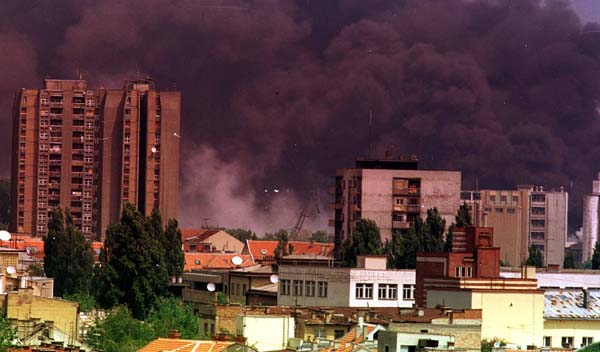 Нато бомбардовање СР Југославија 1999. године. Нато бомбе свакодневно су погађале Рафинерију нафте Нови Сад и изазивале еколошку катастрофу.